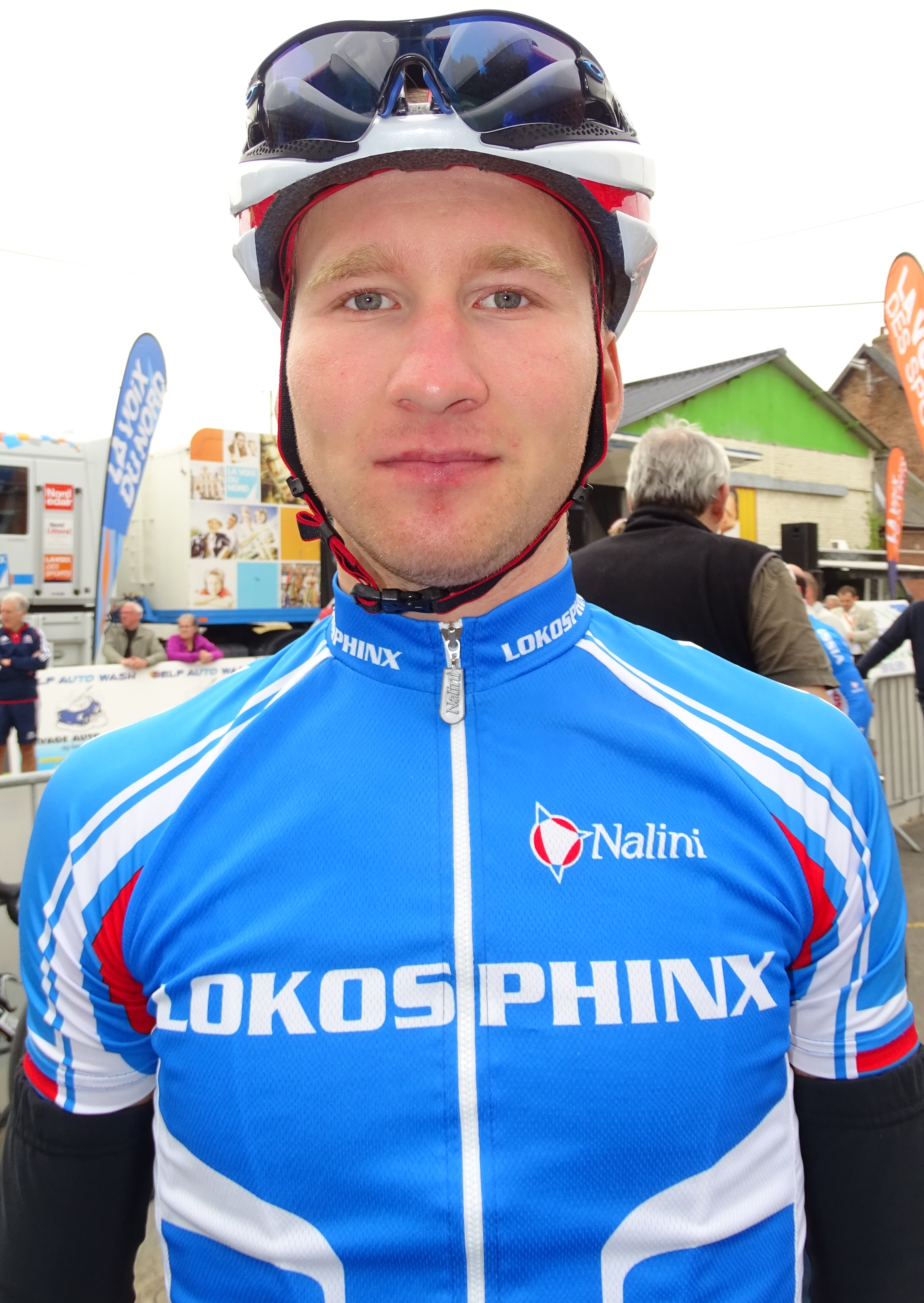 Reportage réalisé le samedi 23 mai 2015 à l'occasion du départ de la deuxième étape du Paris-Arras Tour 2015 à Ficheux, Pas-de-Calais, Nord-Pas-de-Calais, France. Depicted person: Alexander Vdovin Depicted team: Lokosphinx